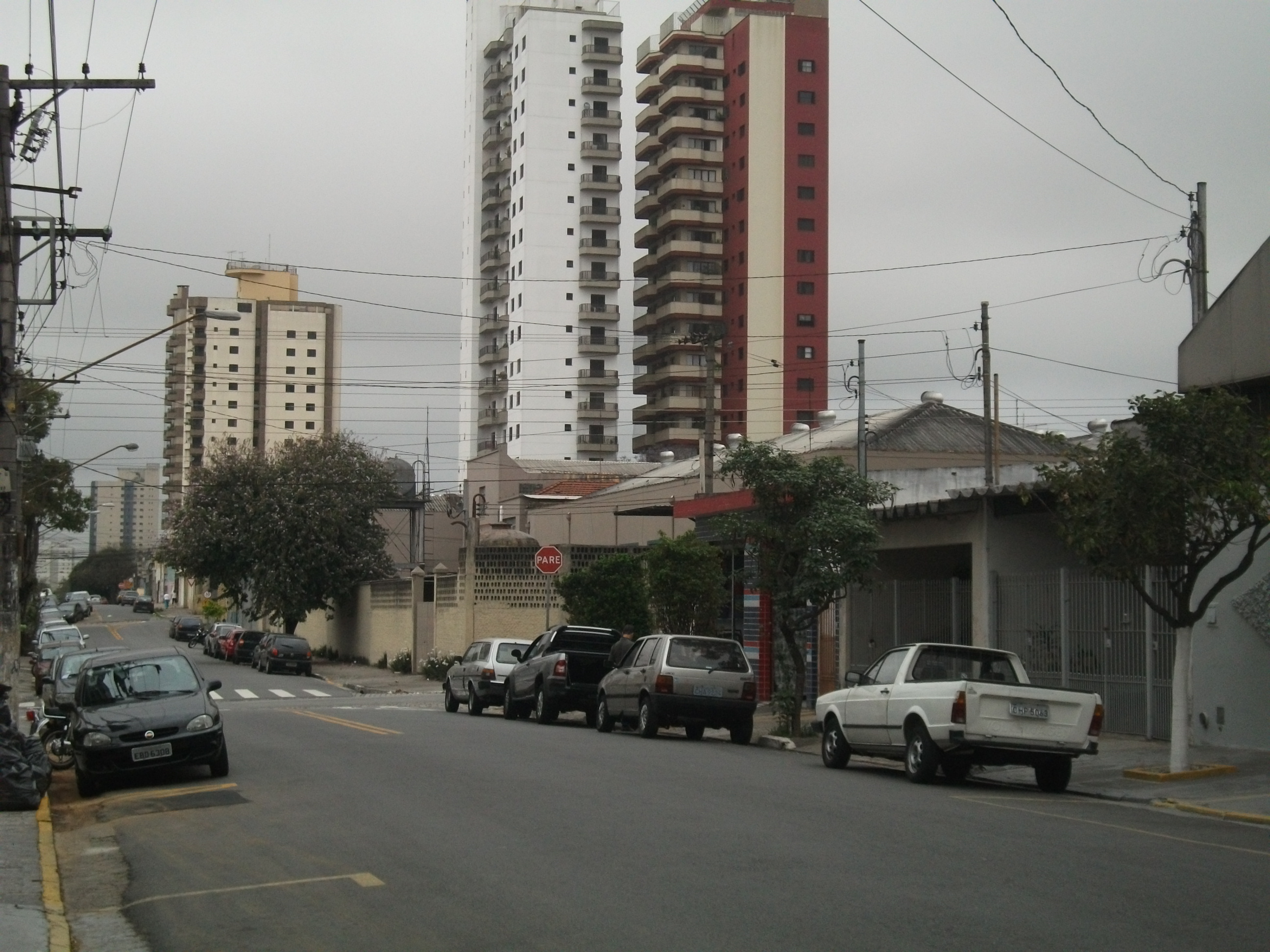 Rua do bairro Vila Carrão na cidade de São Paulo.